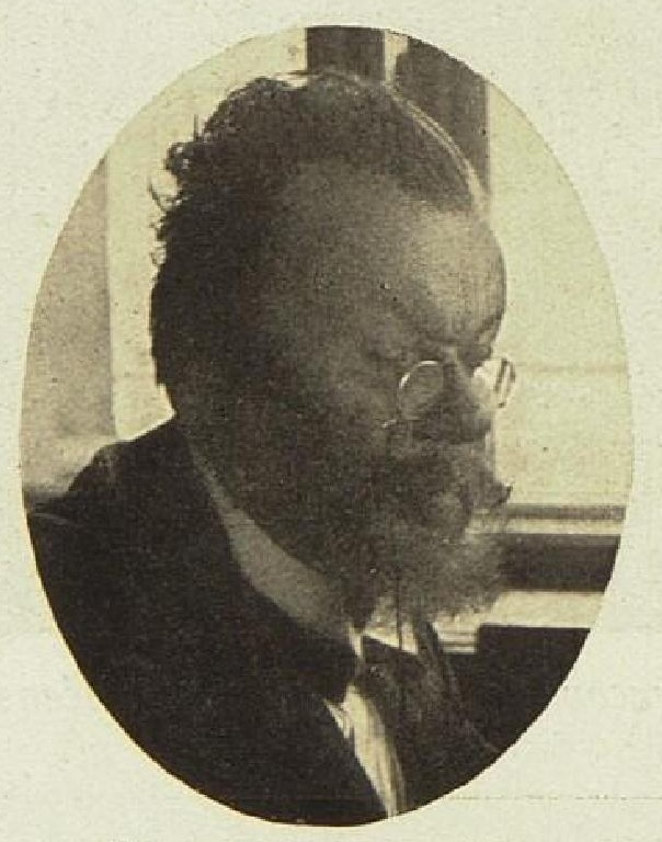 Jindřich Hanuš Böhm (1836-1916), český libretista, překladatel, divadelní a hudební kritik